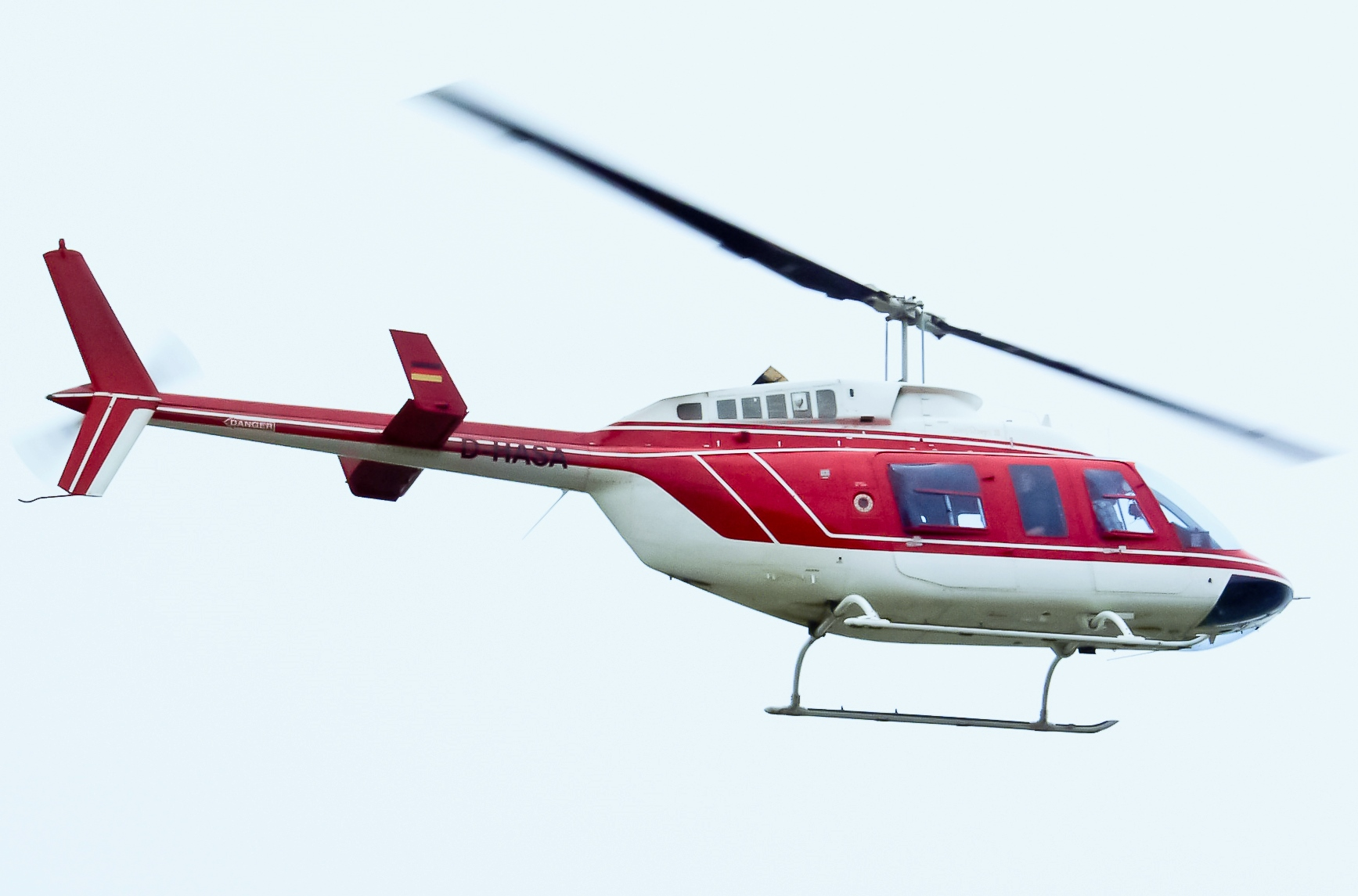 Bell Helicopters - Bell 206 L3 (D-HASA) auf der Flugzeugshow am Airport Niederrhein während der Geburtstagsfeier zum einjährigen Bestehens des Flughafens.